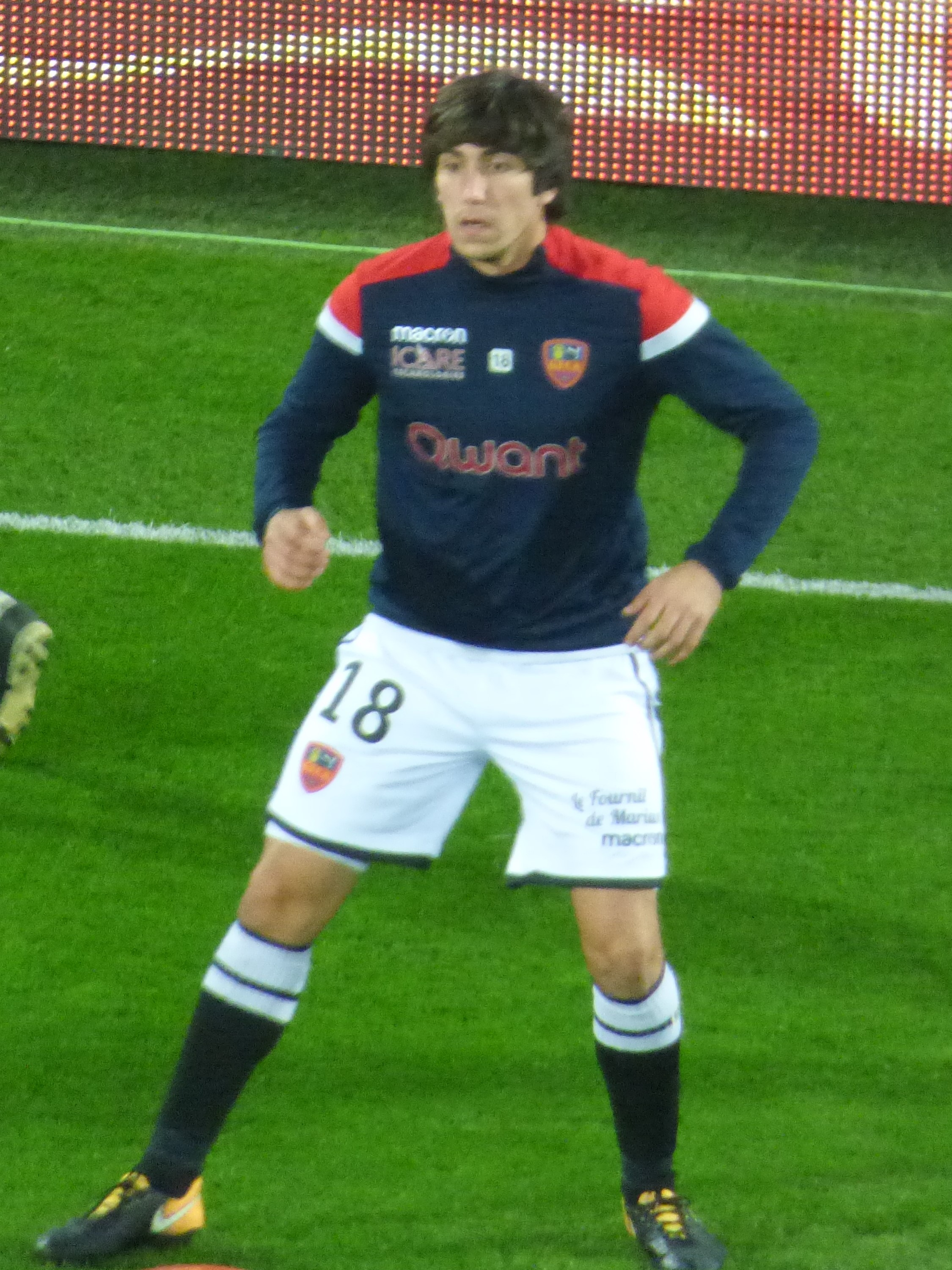 Dominique Guidi avant le match RC Lens / GFC Ajaccio, comptant pour la onzième journée du championnat de France de Ligue 2 2018-2019 au Stade Bollaert-Delelis, le 22 octobre 2018.